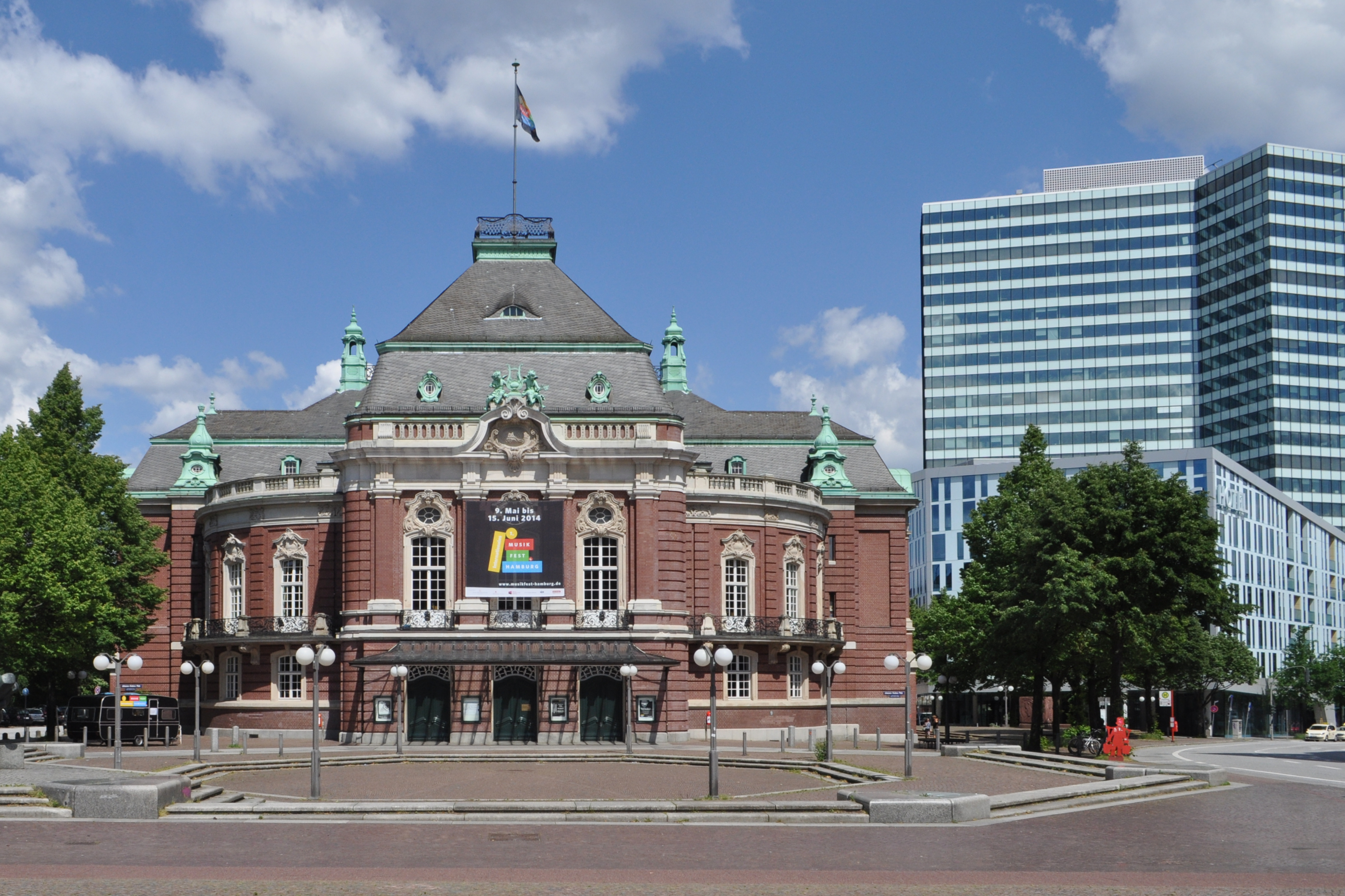 Laeisz-Halle in Hamburg-Neustadt. This is a photograph of an architectural monument.